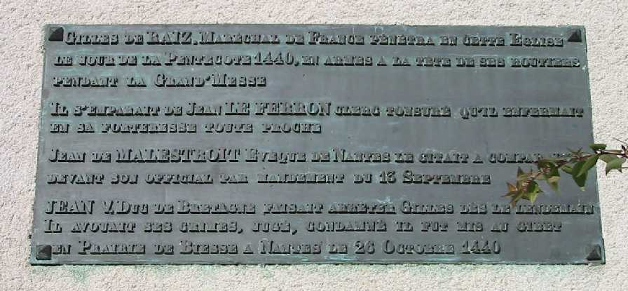 Plaque de commémoration de l'arrestation de Gilles de Rais apposée sur le clocher de Saint-Etienne-de-Mer-Morte. Gilles de Raiz, Maréchal de France, pénétra en cette église, le jour de la Pentecôte 1440, en armes, à la tête de ses routiers pendant la grand'messe. Il s'emparait de Jean le Ferron, clerc tonsuré, qu'il enfermait en sa forteresse toute proche. Jean de Malestroit, évêque de Nantes le citait à comparaître devant son official par mandement du 13 septembre. Jean V duc de Bretagne, faisait arrêter Gilles dès le lendemain. Il avouait ses crimes. Jugé, condamné, il fut mis au gibet en prairie de Biesse à Nantes le 26 octobre 1440.